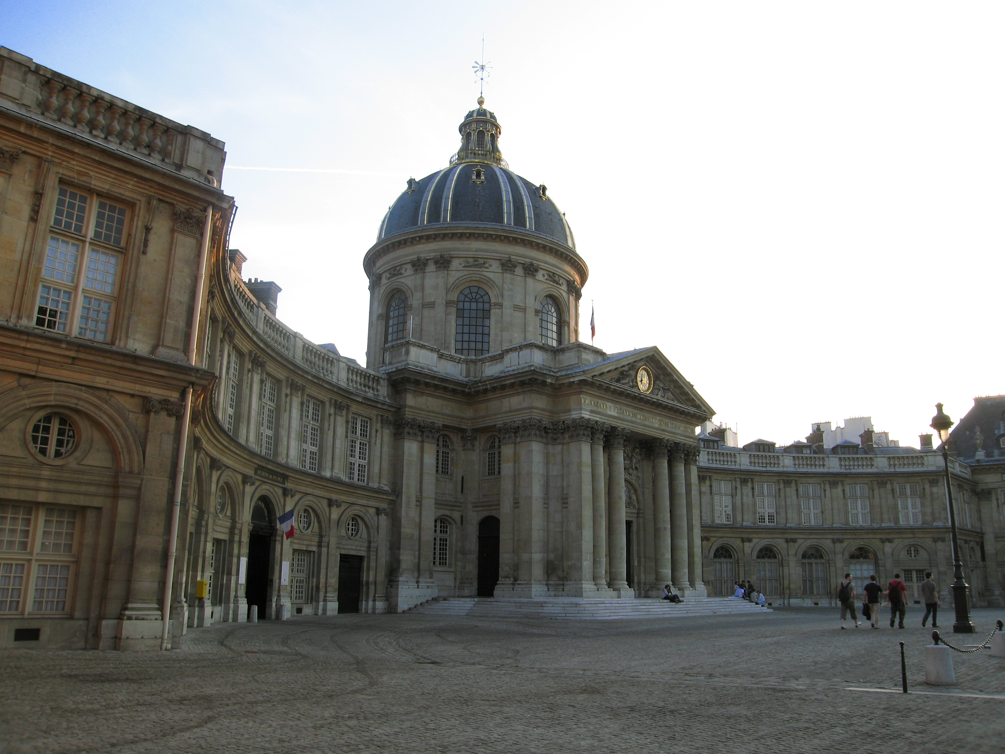 Institut de France